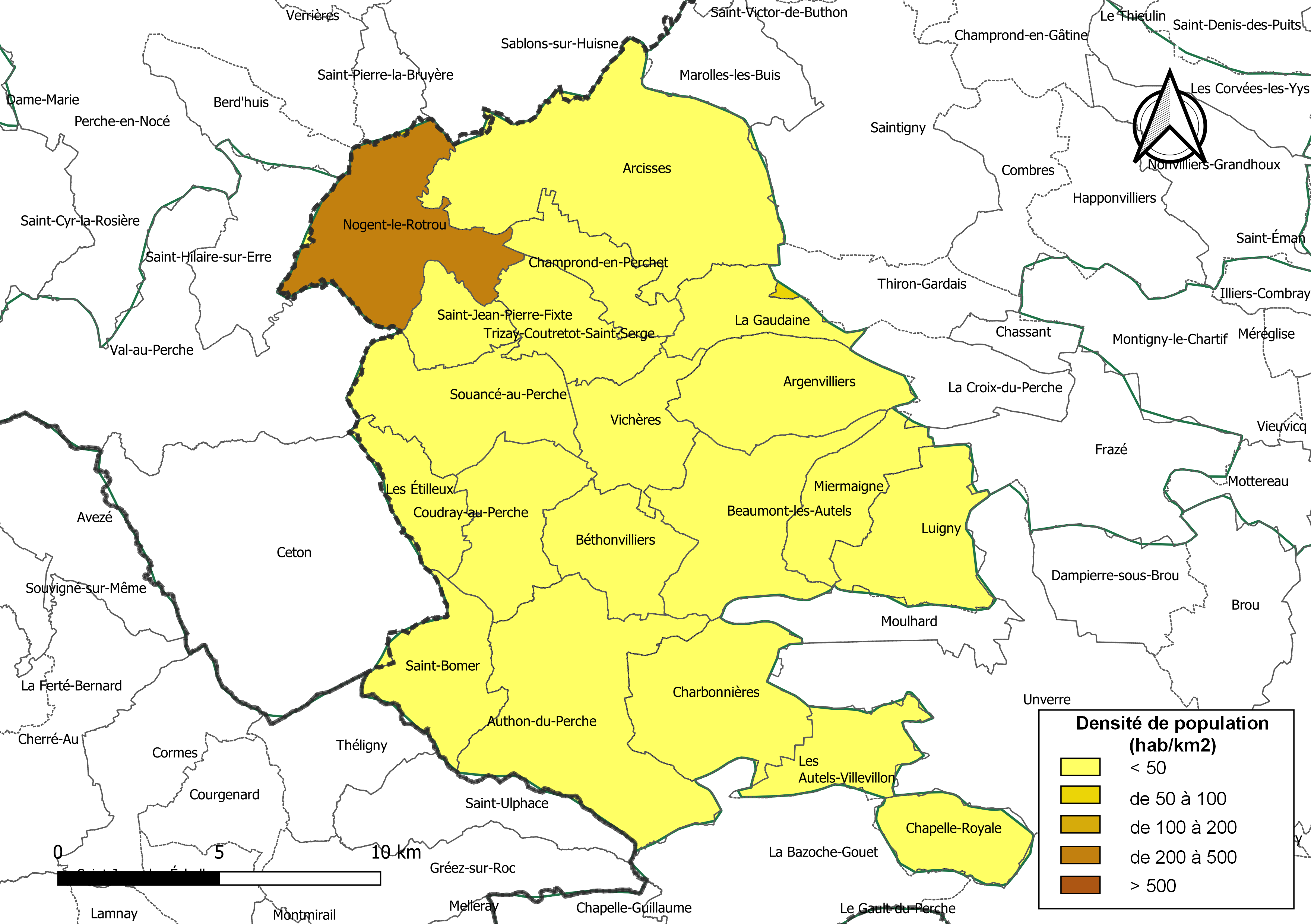 Carte des densités de population (millésimée 2016) des communes de la communauté de communes la Communauté de communes du Perche, département d'Eure-et-Loir, France. Composition au 1er janvier 2019.